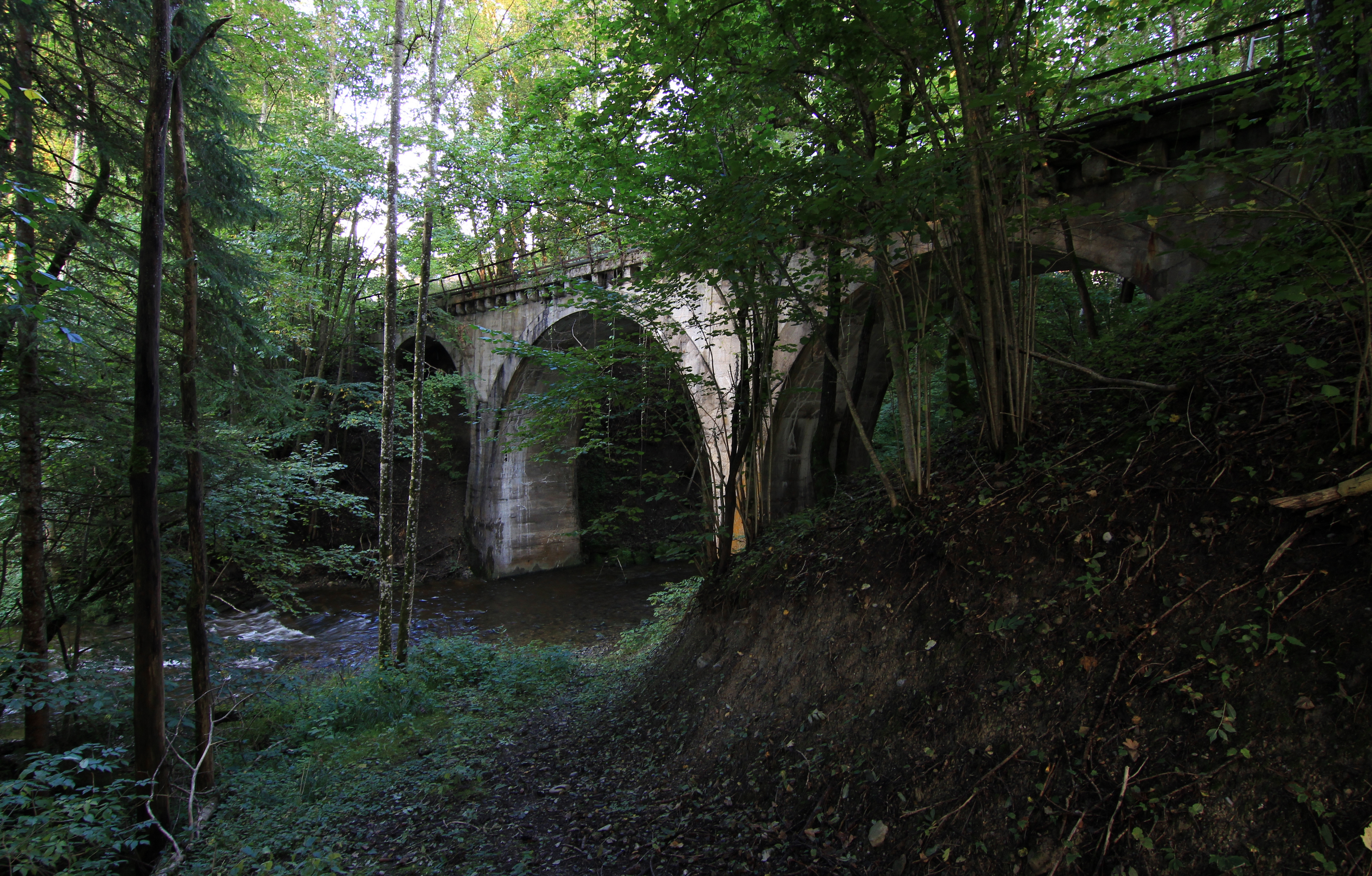 Rottachbrücke in Kempten, ehemalige Eisenbahnbrücke Gewölbeviadukt aus Stampfbeton, 1908This is a photograph of an architectural monument.